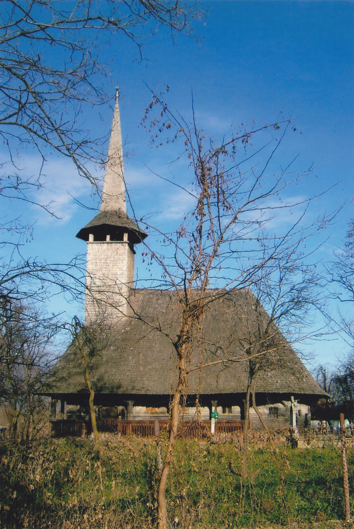 Biserică de lemn construită în 1700. În Bihor nu există biserică mai veche de anul 1700.